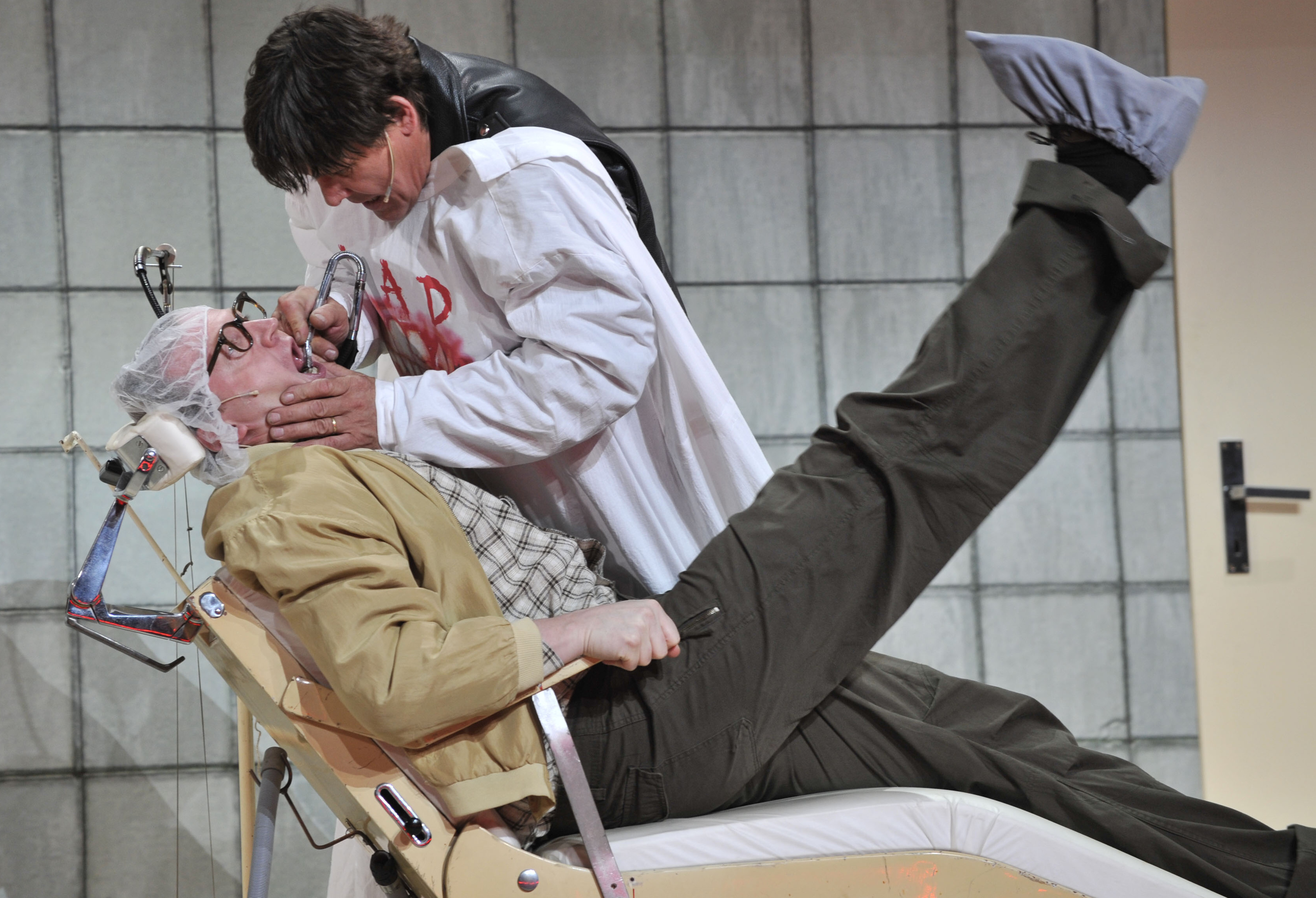 Foto z inscenace muzikálu Kvítek z horrroru v Městském divadle Brno v režii Petra Gazdíka (premiérováno 21. května 2011). Martin Havelka v roli zubního lékaře Orina a Milan Němec jako šílený pacient.